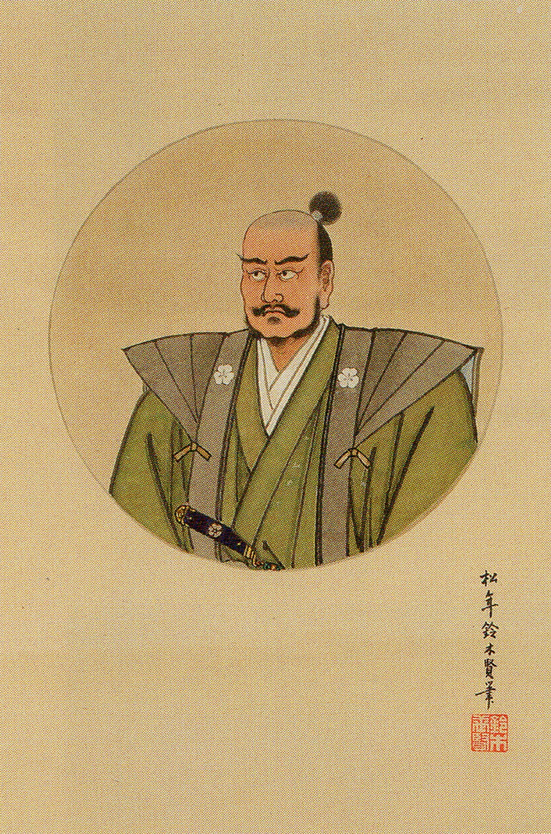 長宗我部盛親の肖像。